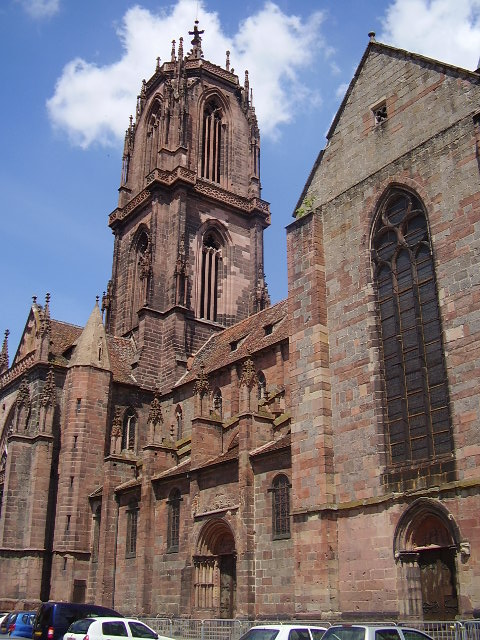 cathédrale, sélestat